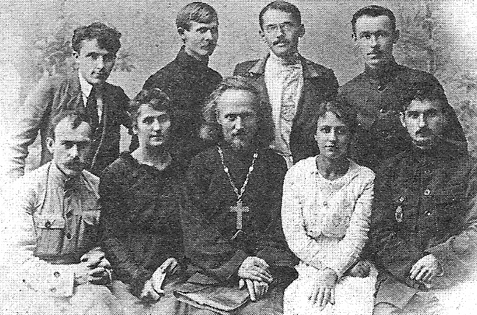 Працівники Ізяславської шкільної управи. Перший з правого боку внизу Арсен Річинський.